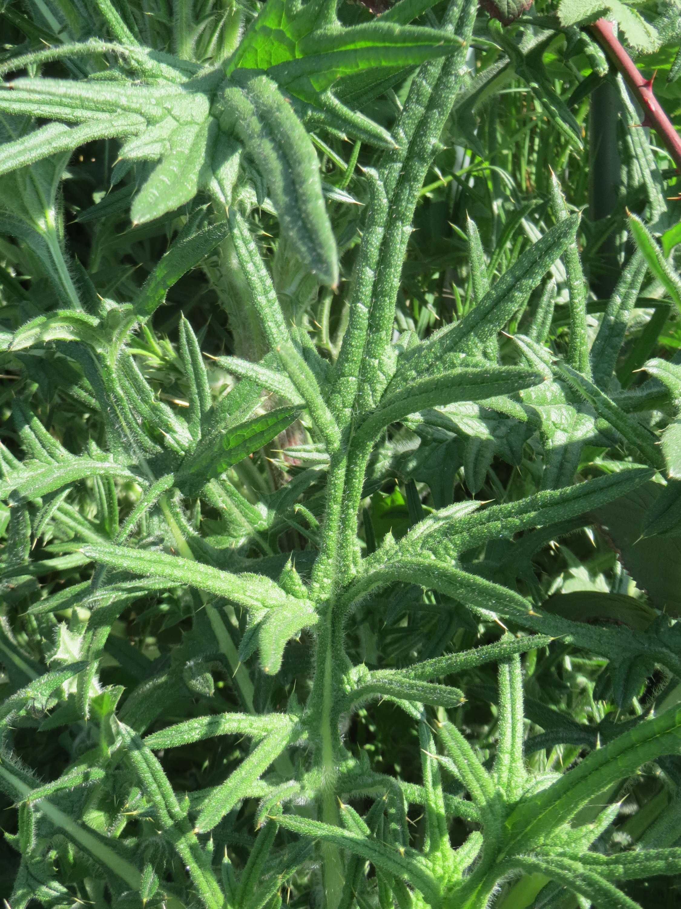 Grundblätter der Gewöhnlichen Kratzdistel (Cirsium vulgare) auf einem Parkplatz in Hockenheim